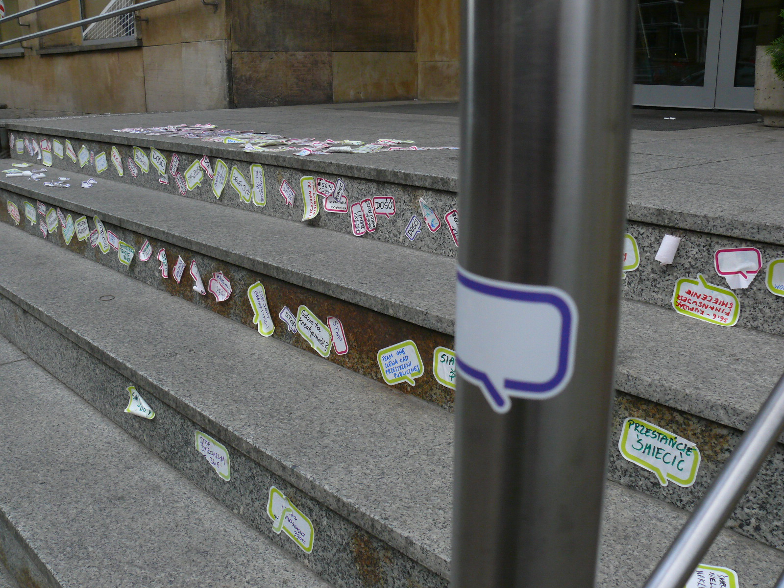 Efekt happeningu Grupy Pewnych Osób